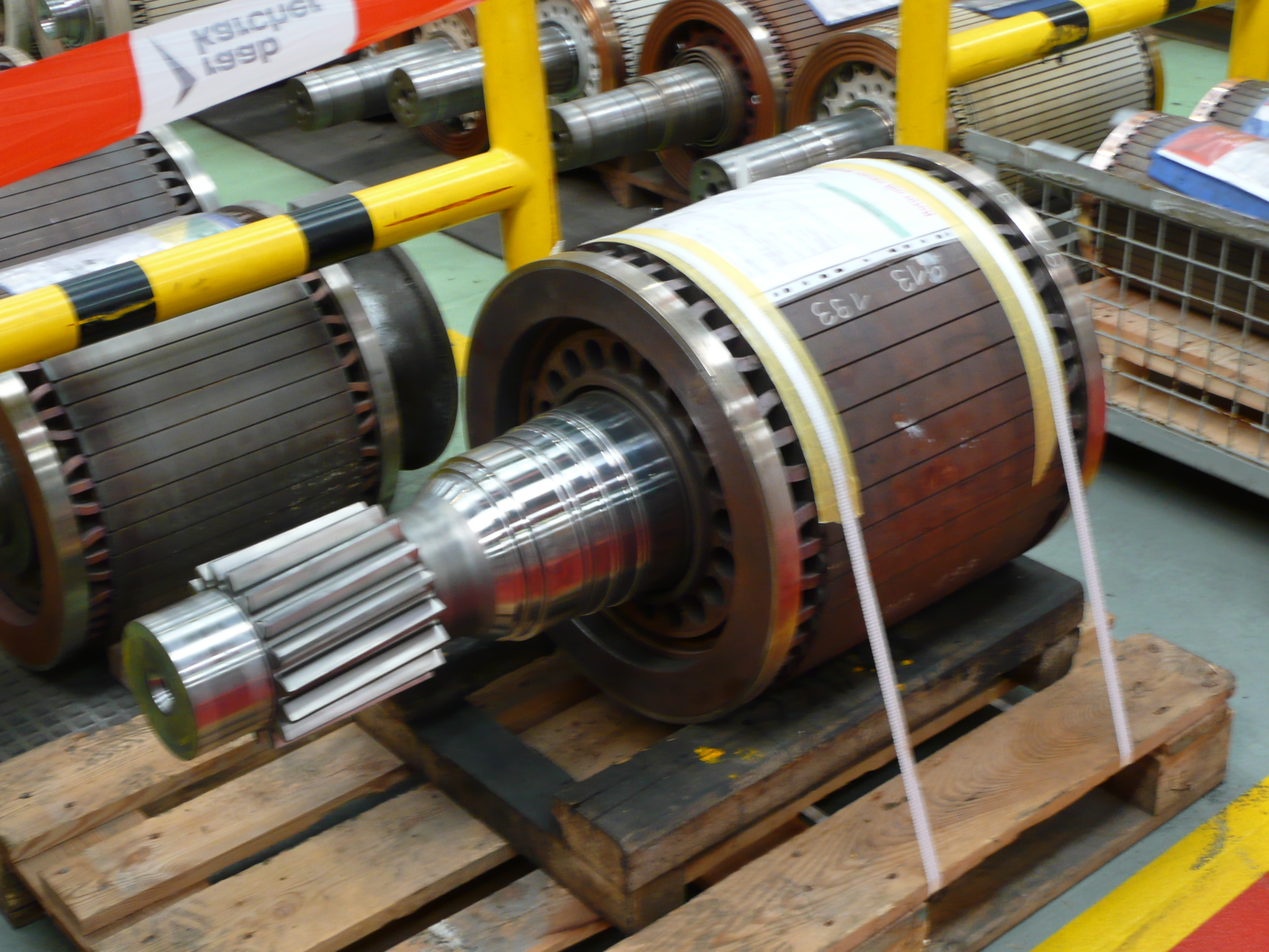 Rotor eines Fahrmotors der Baureihe 152 in der Fahrmotorenwerkstatt des AW Dessau